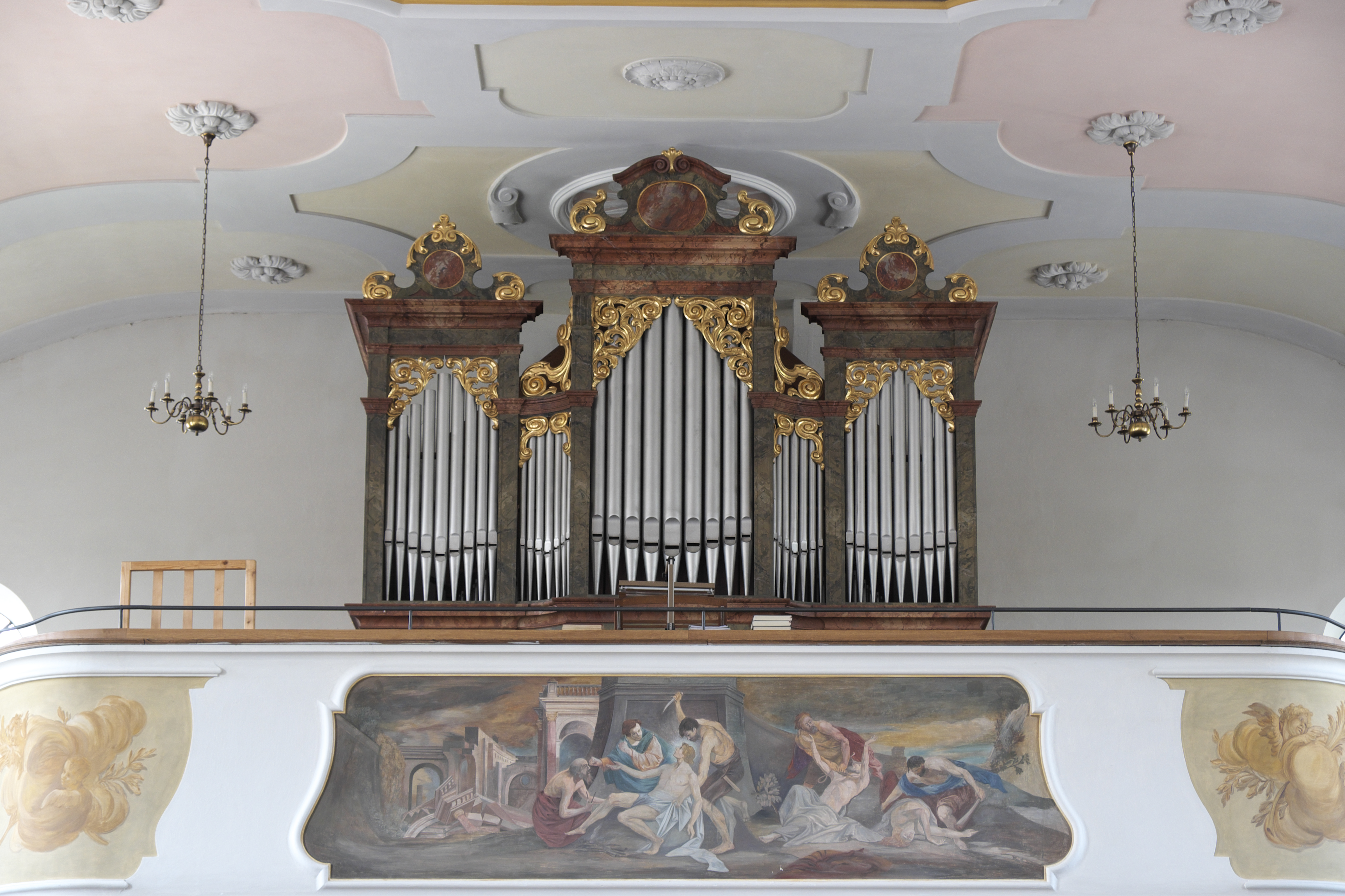 Katholische Pfarrkirche St. Vitus in Maisach im Landkreis Fürstenfeldbruck (Bayern/Deutschland), Orgel